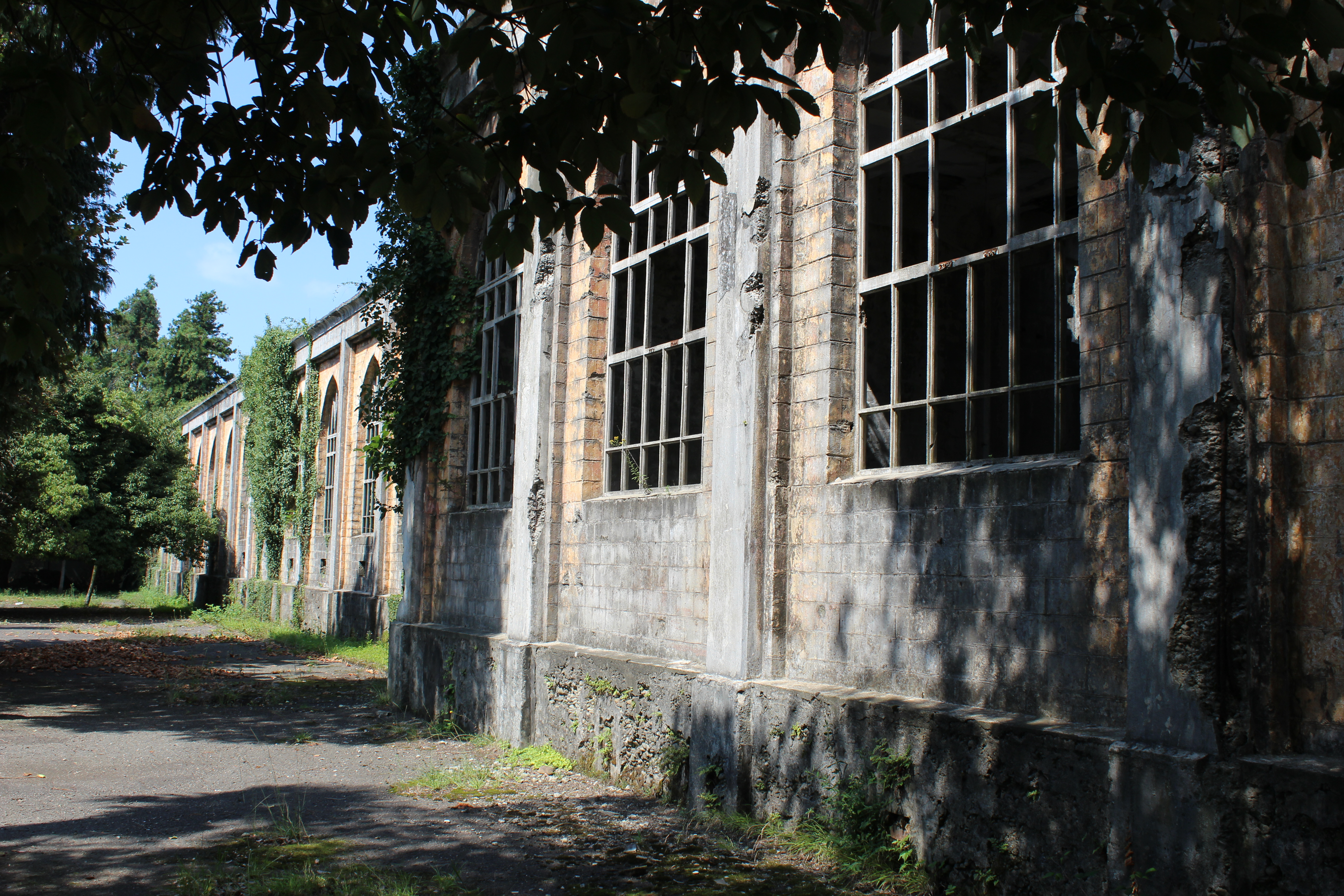 ყოფილი აბრეშუმის ძაფსაღებ-ძაფსაგრეხი ფაბრიკა